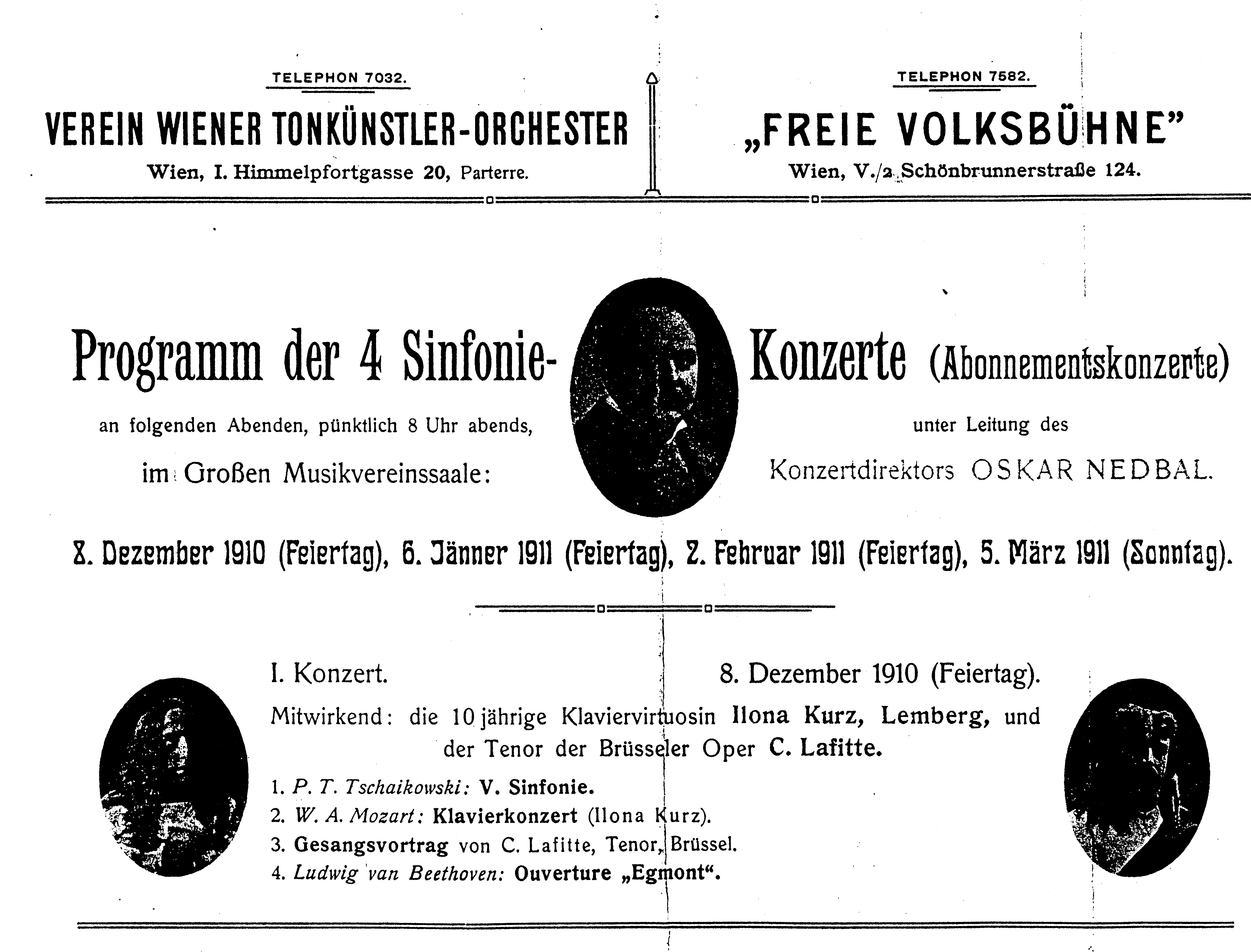 Ilona Štěpánová